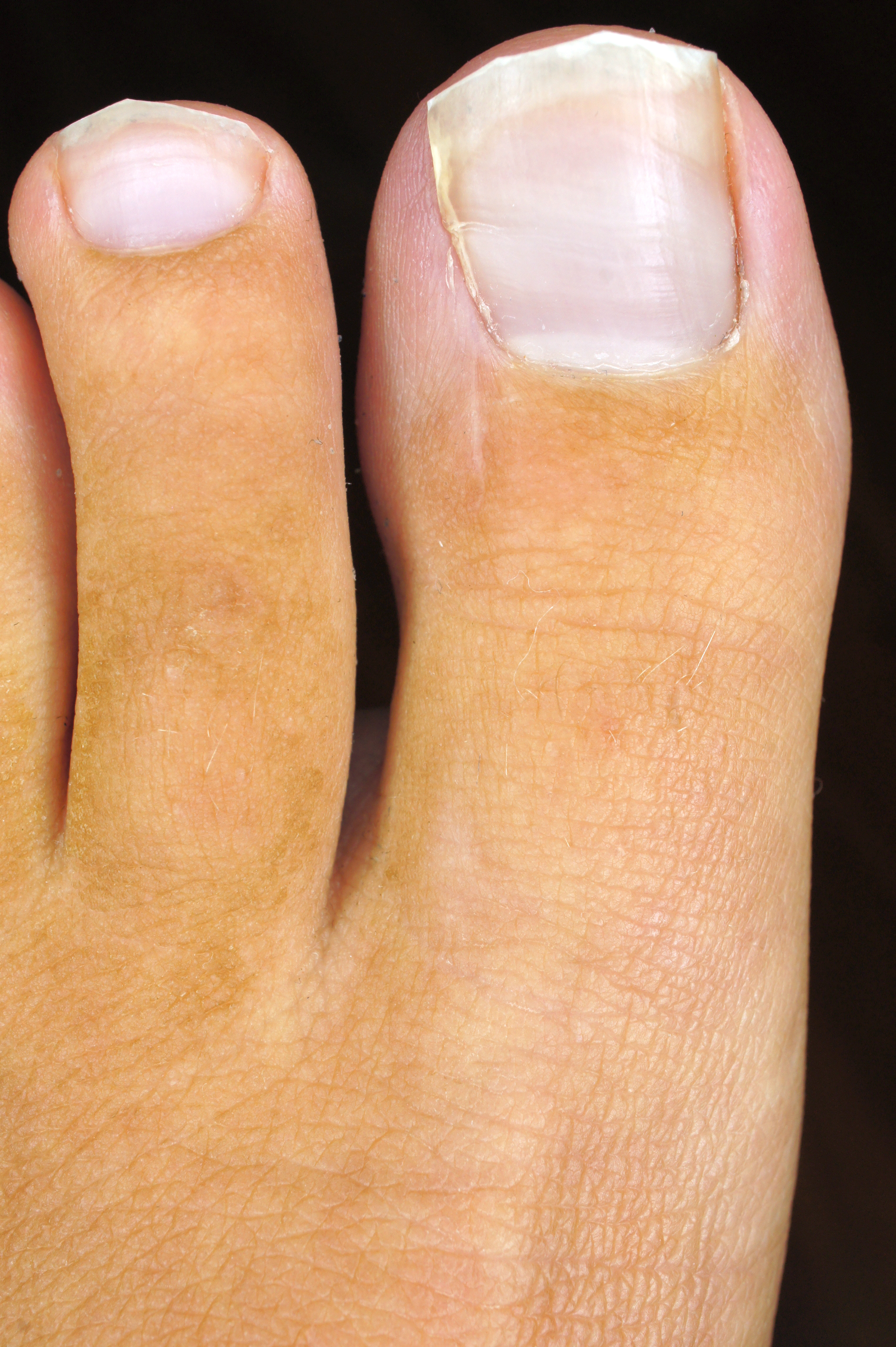 Zustand nach zurückliegender Emmert-Plastik der linken Großzehe, linksseitig. Der Nagel ist praktisch nicht sichtbar verschmälert - abhängig vom Operateur.